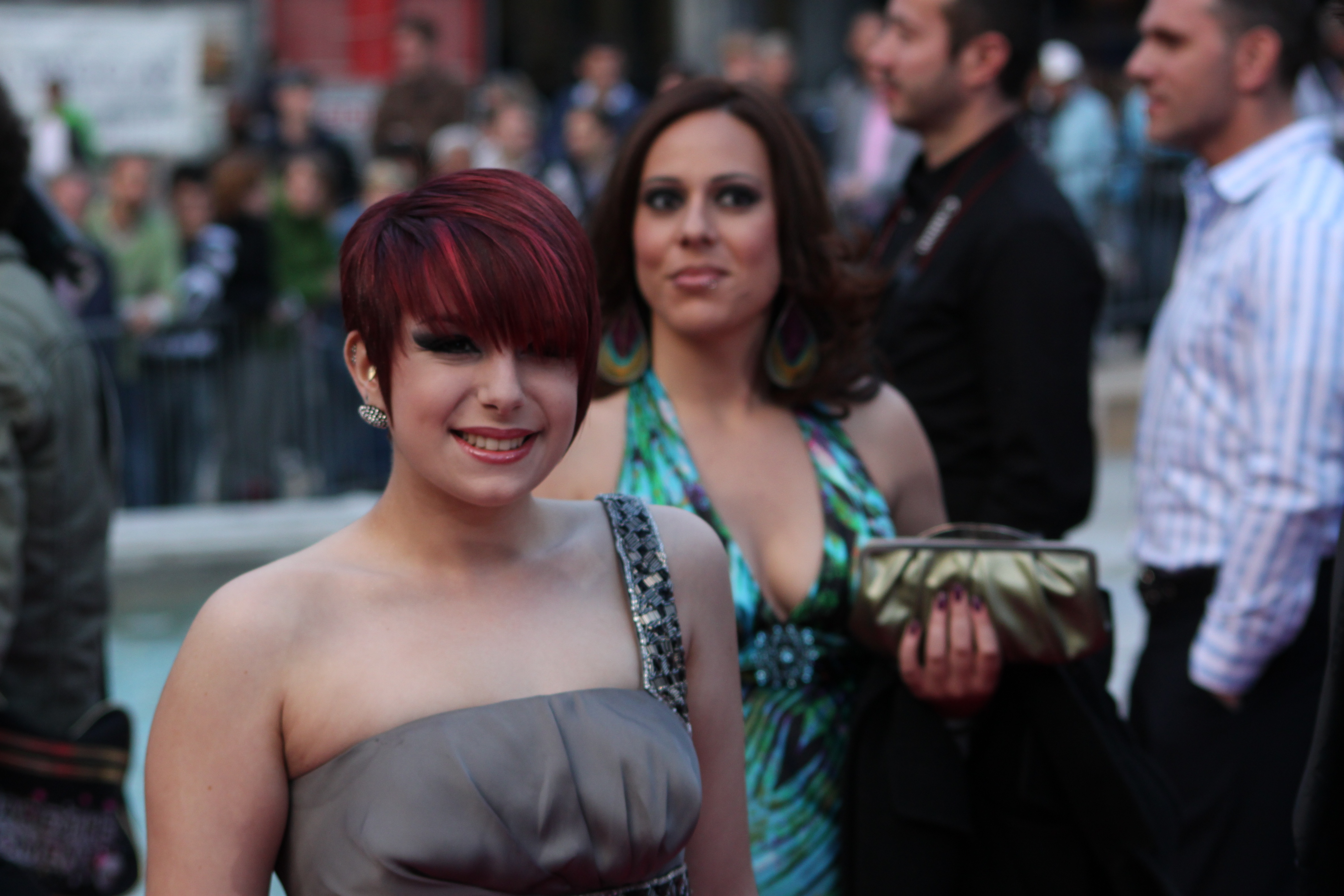 Foto: Vincent Hasselgård, Aktiv I Oslo.no